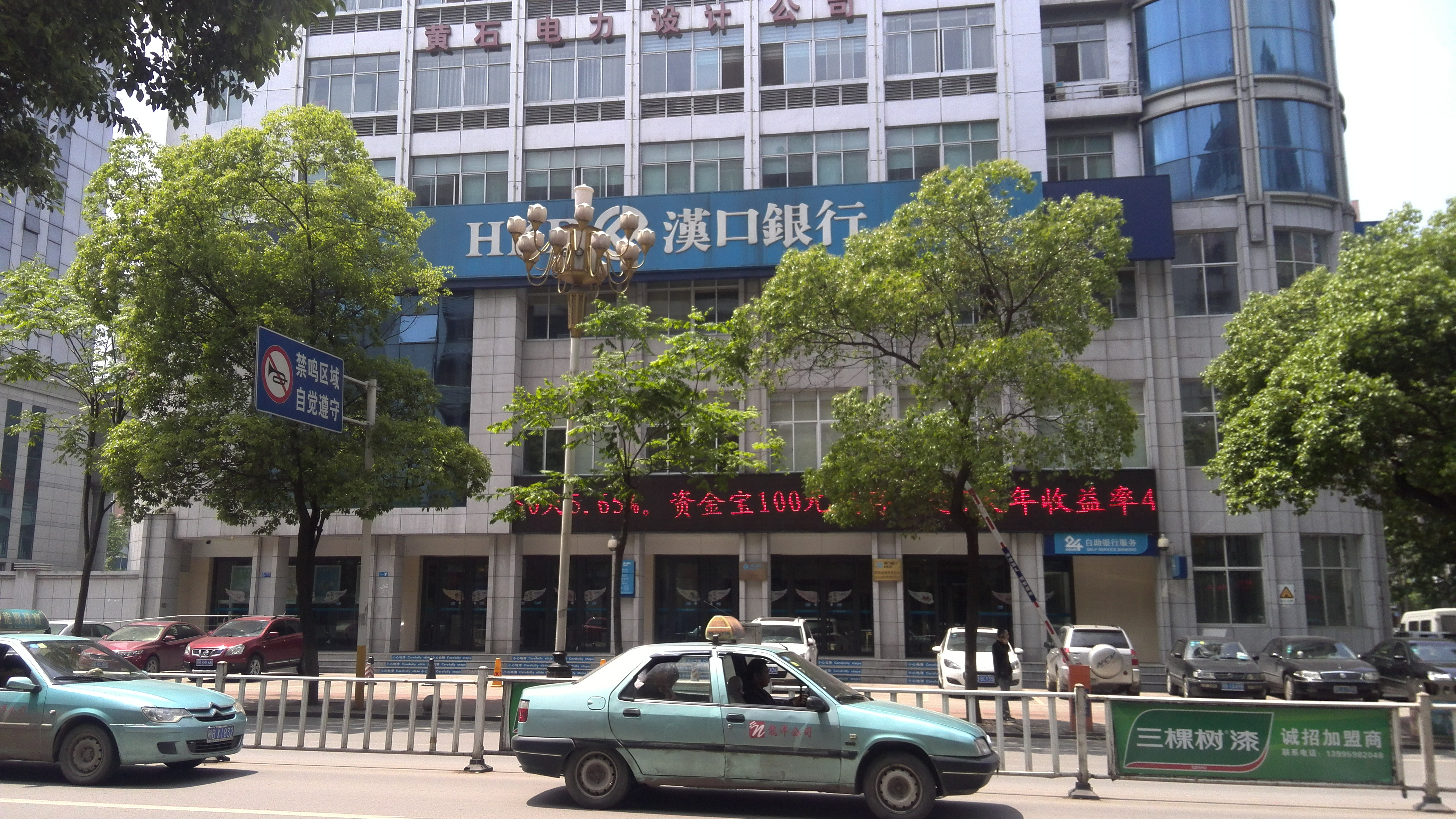 中文（中国大陆）: 汉口银行黄石分行